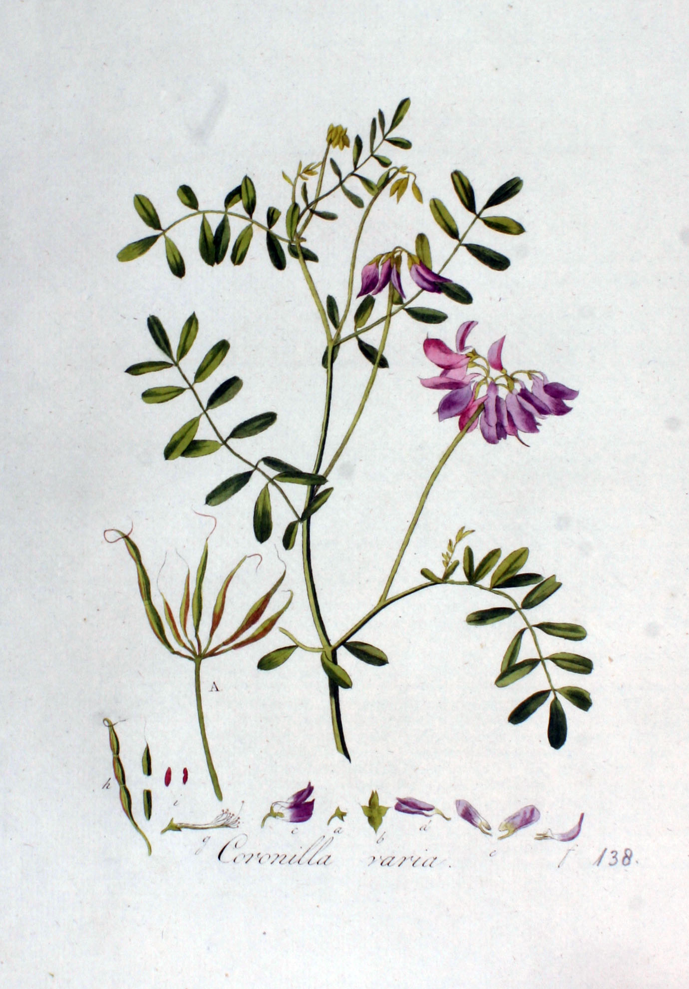 Securigera varia (L.) Lassen (Syn. Coronilla varia L.)